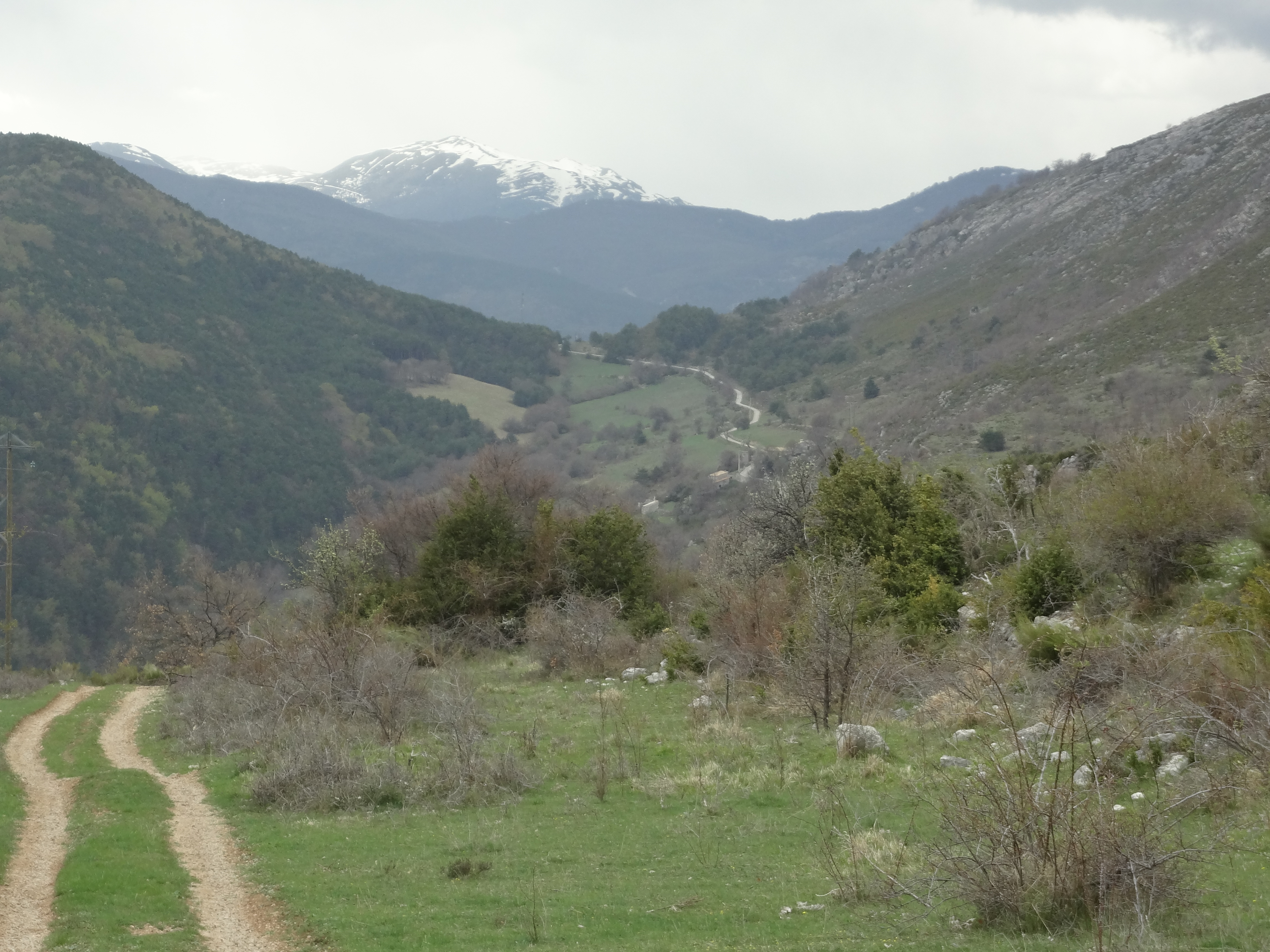 Col du Trébuchet (Alpes-de-Haute-Provence), vu d'au-dessus d’Avenos. Au loin, le pic de Chabran (1541)